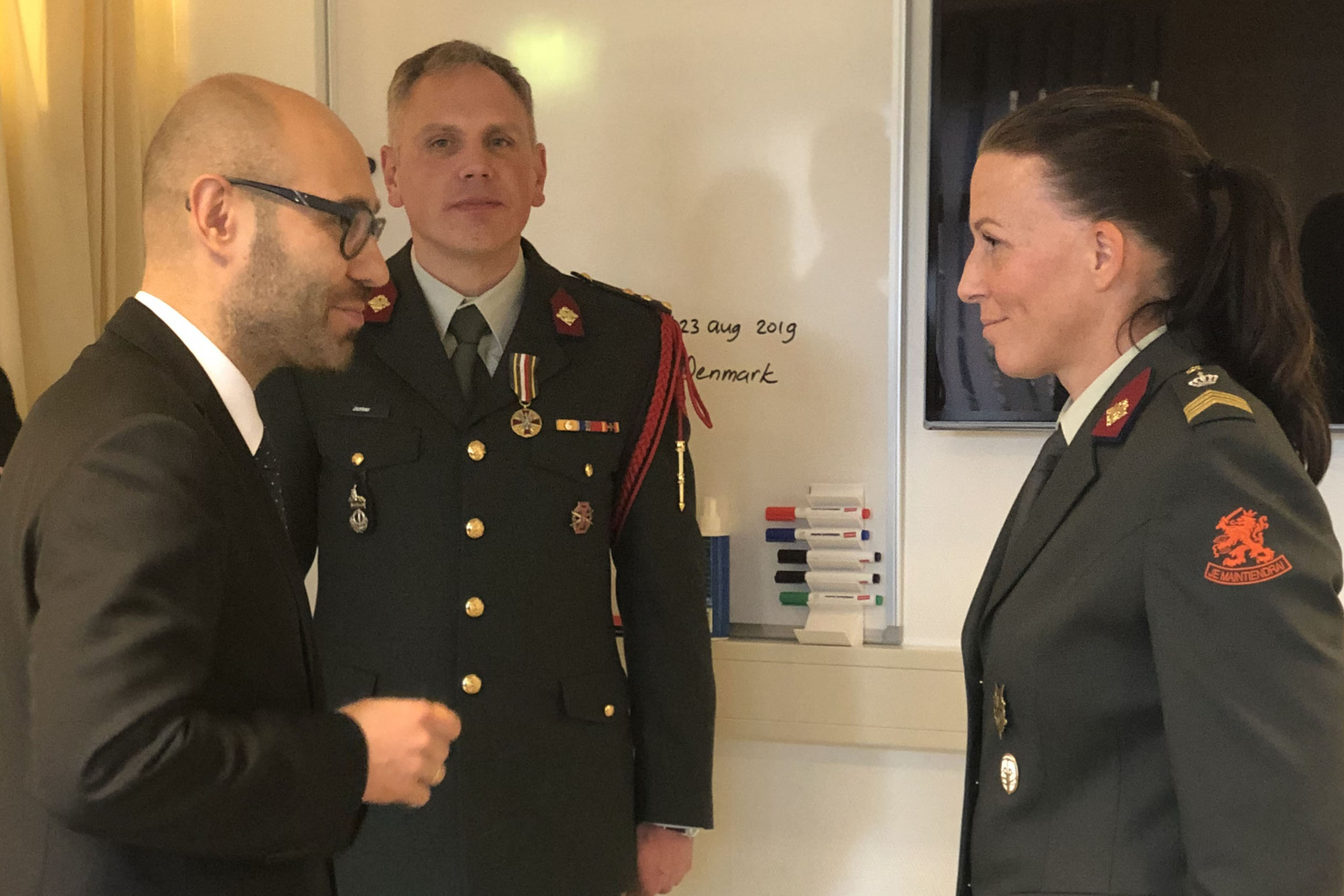 Vele jaren spanden ze zich in om in de Tweede Wereldoorlog omgekomen Poolse militairen te identificeren. Het zijn kapitein Geert Jonker en sergeant-majoor Els Schiltmans van de Bergings- en Identificatiedienst Koninklijke Landmacht (BIDKL). Vanmorgen zijn ze allebei onderscheiden met de Medal Wojska Polskiego, een medaille van het Poolse leger.